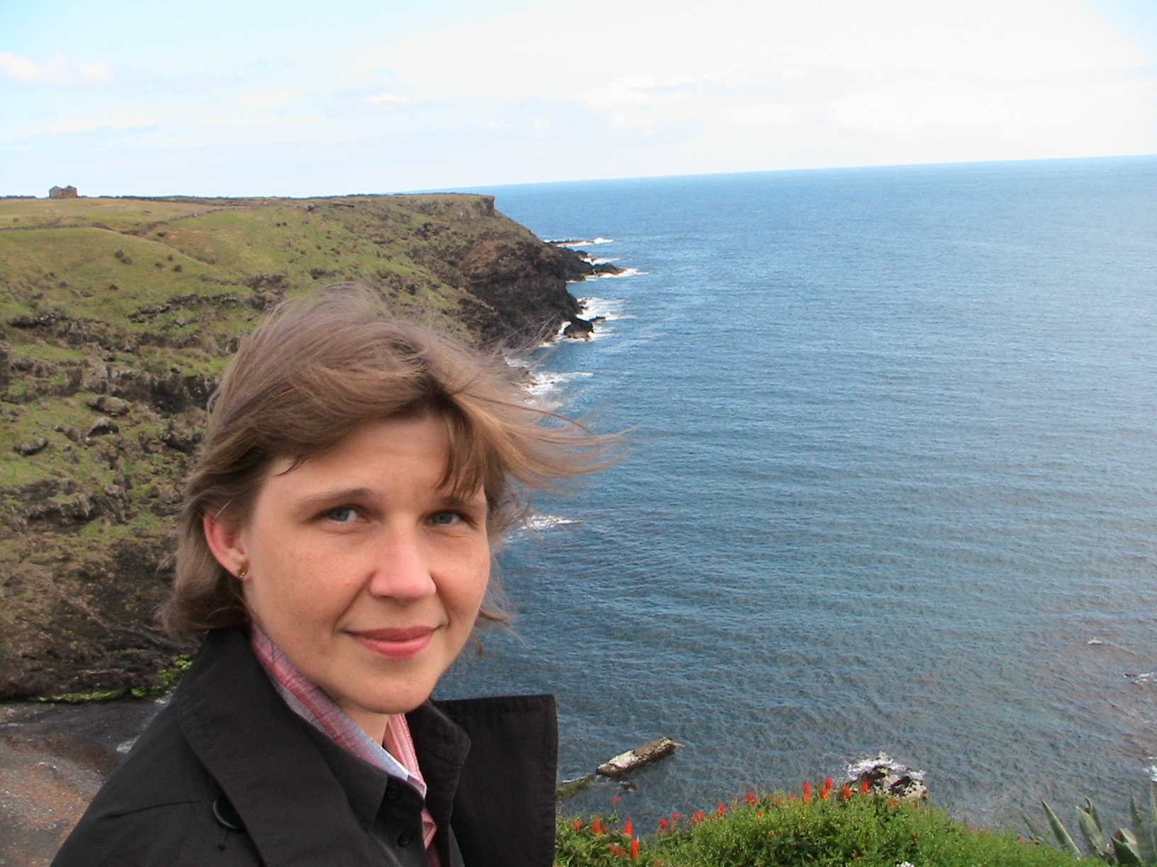 Merike Vardja